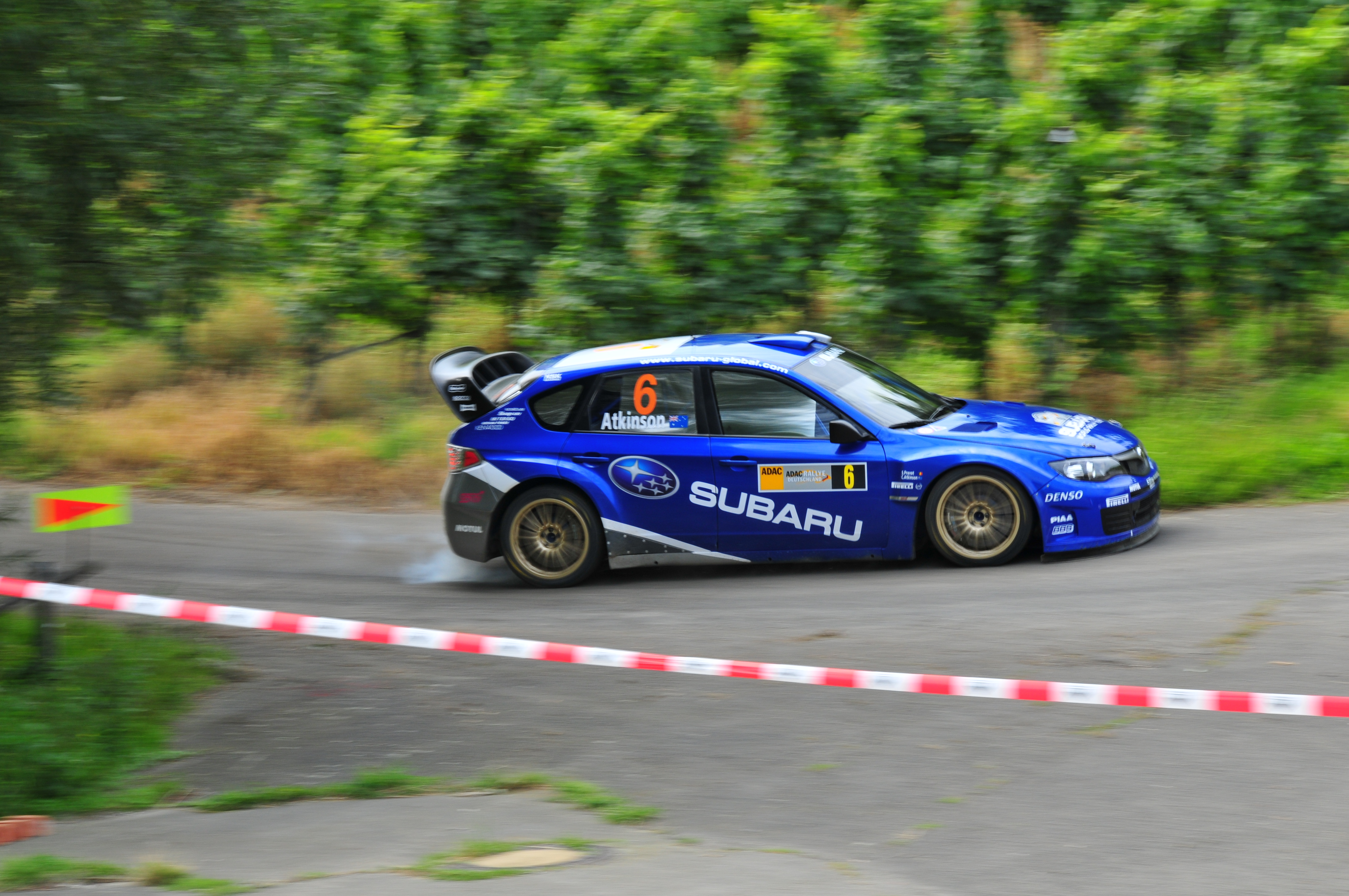 Chris Atkinson driving his Subaru Impreza WRC2008 at the 2008 Rallye Deutschland.